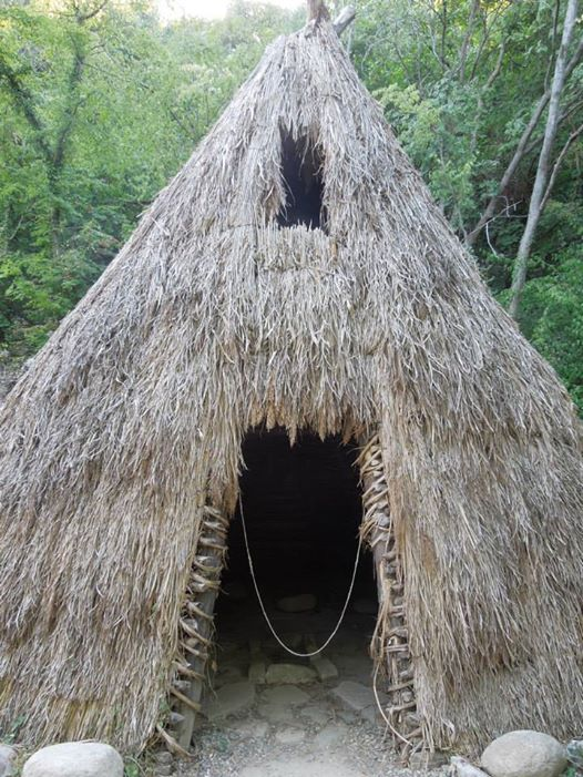 Replika kuće.